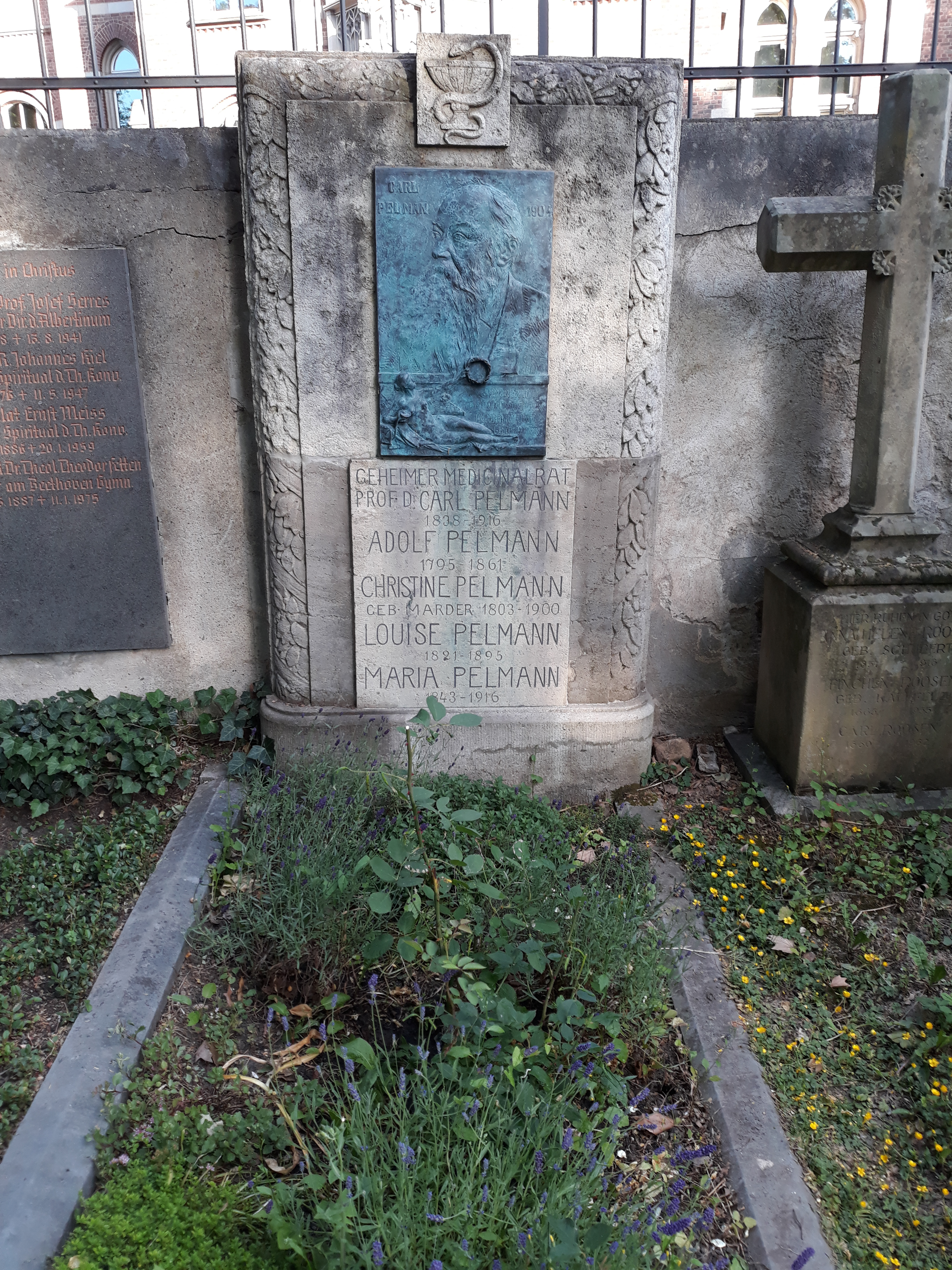 Das Grab des deutschen Psychiaters Carl Pelmann im Familiengrab auf dem Alten Friedhof Bonn.